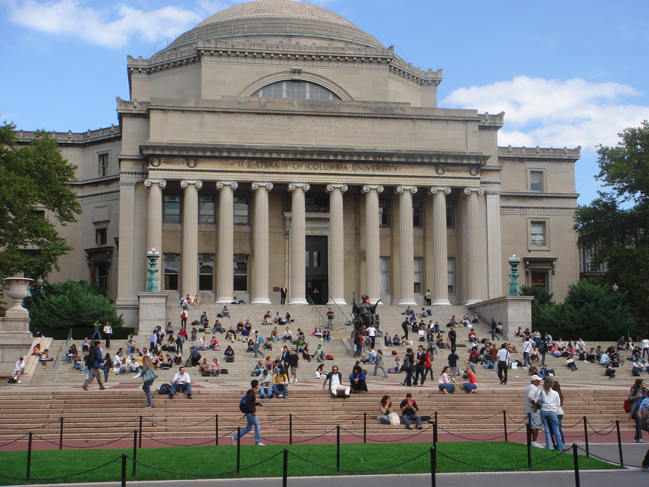 У здания библиотеки Колумбийского Университета во время учебного года